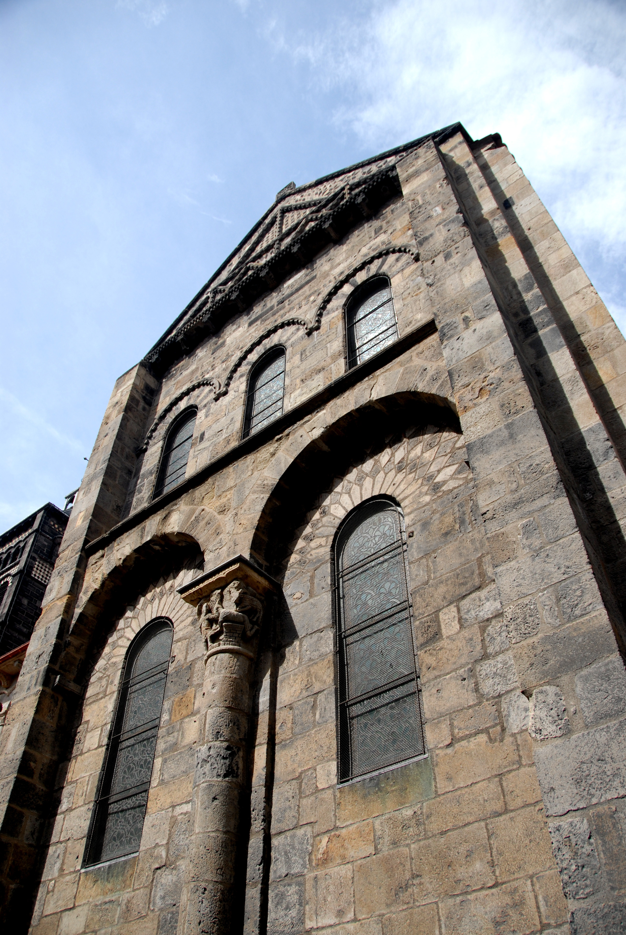 Notre-Dame du Port, Querhausarm, Südwand